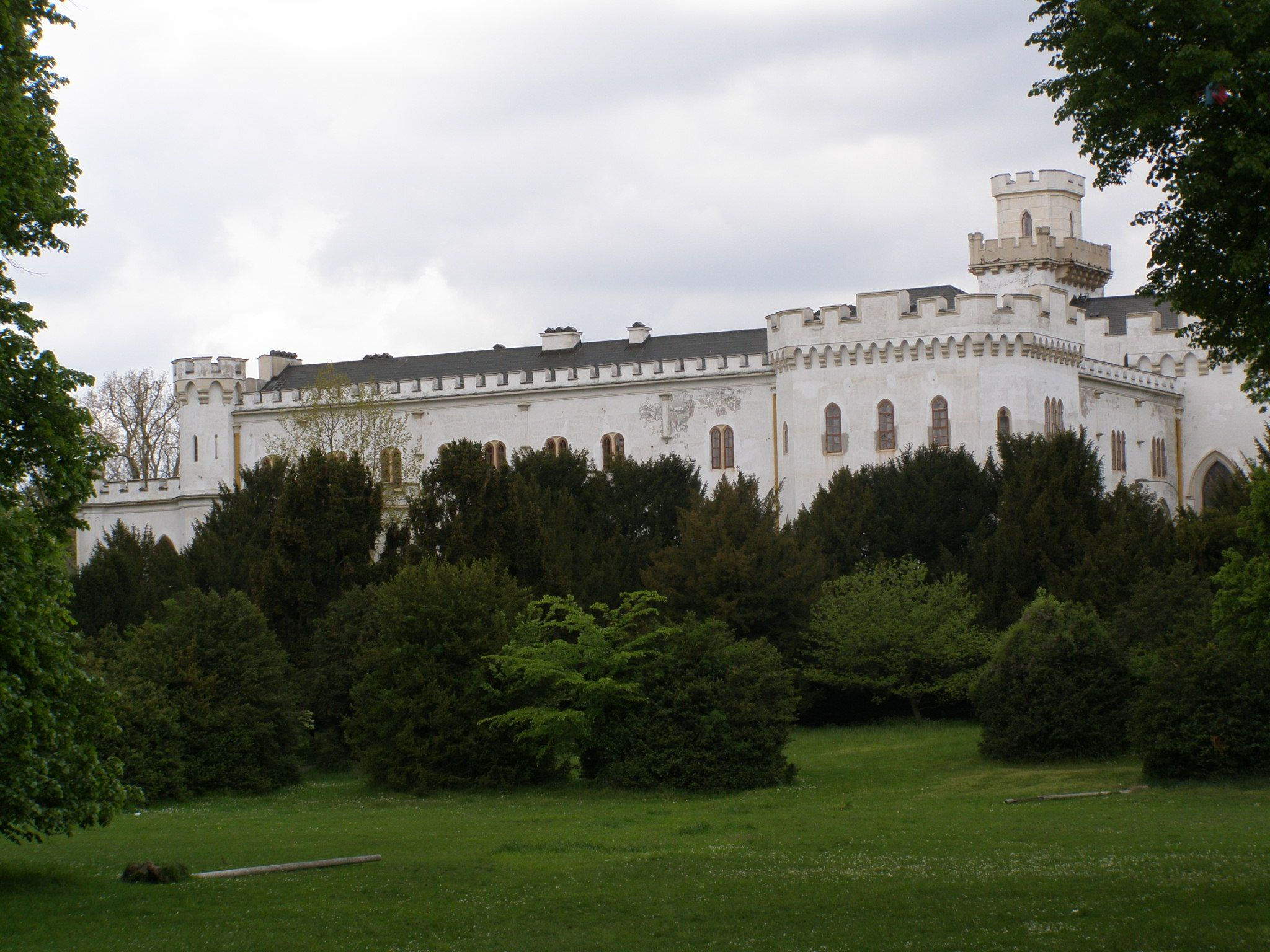 Rusovce - kaštieľ, pohľad na východné krídlo z parku